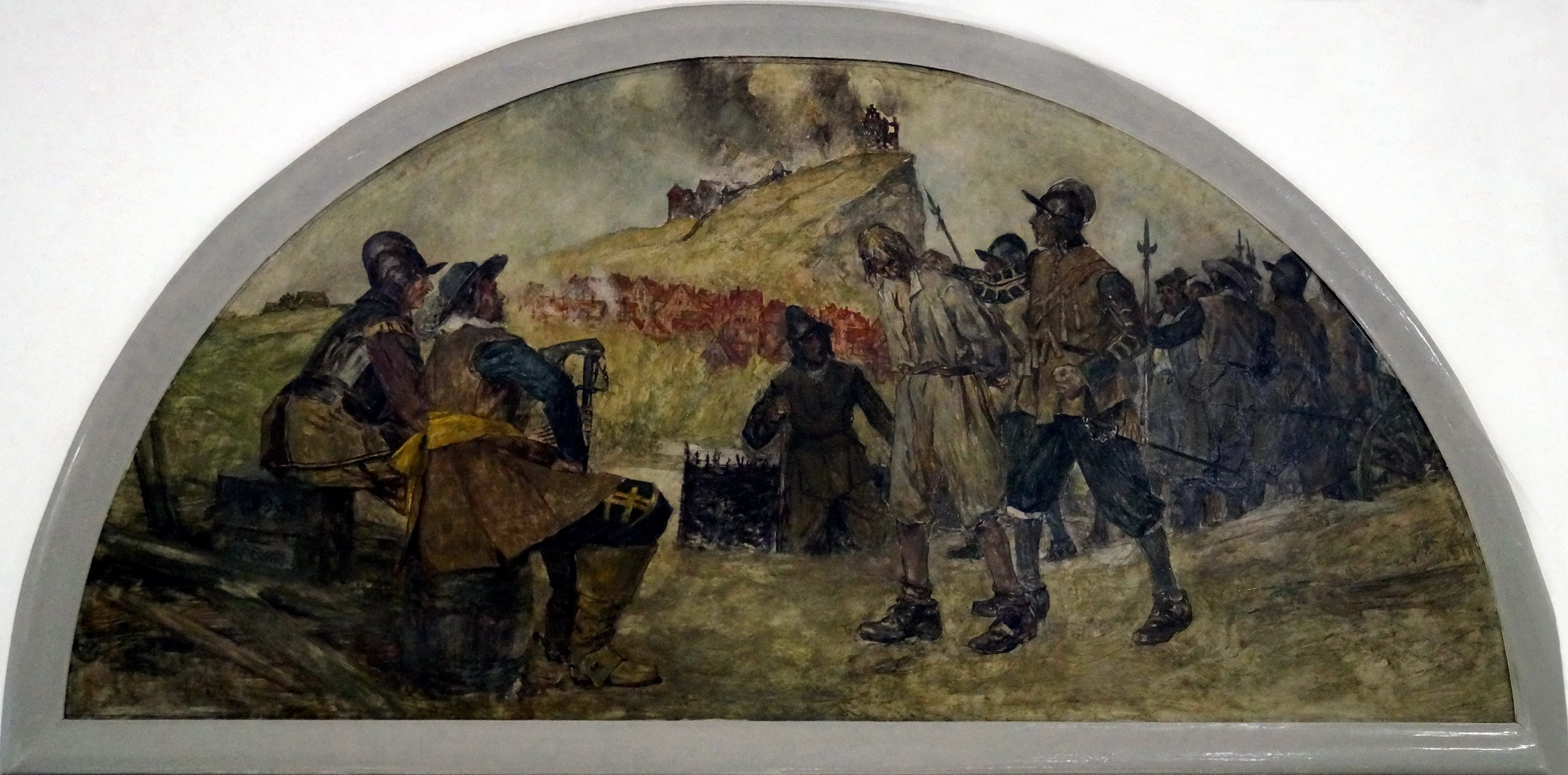 General Torstensson mit "Schnapphahn" vor der brennenden Siegesburg (1644), Ölgemälde von Karl Storch dem Älteren, 1936